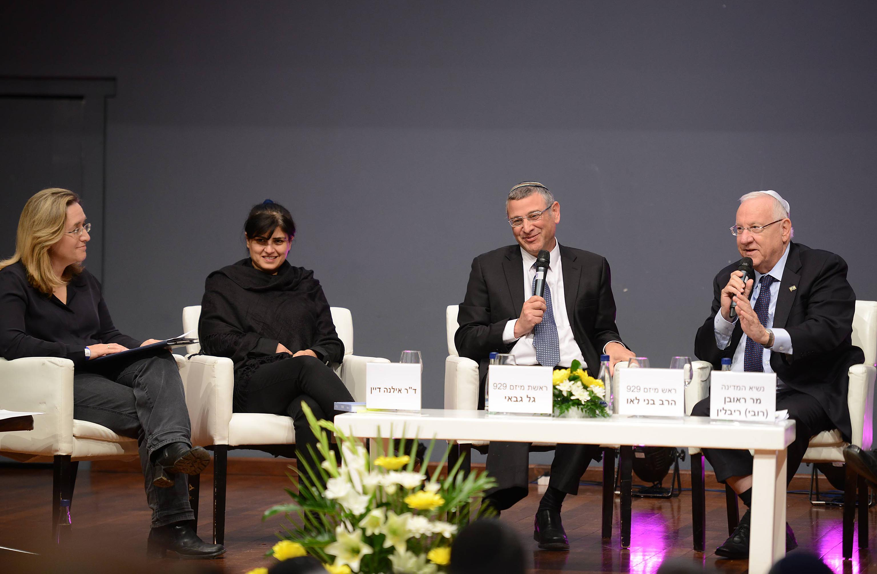 חוג התנ"ך של בית נשיא מדינת ישראל בשיתוף מיזם 929 באוניברסיטת חיפה בתמונה מימין לשמאל ראובן ריבלין, הרב בני לאו, העיתונאית גל גבאי והעיתונאית אילנה דיין